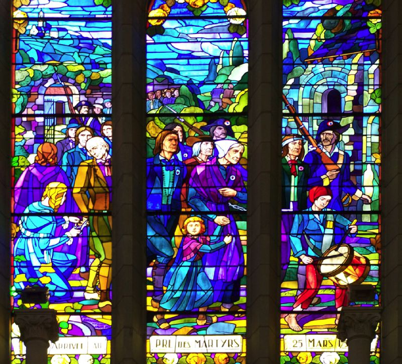 Fusillades du Marillais en 1794 - Guerre de Vendée